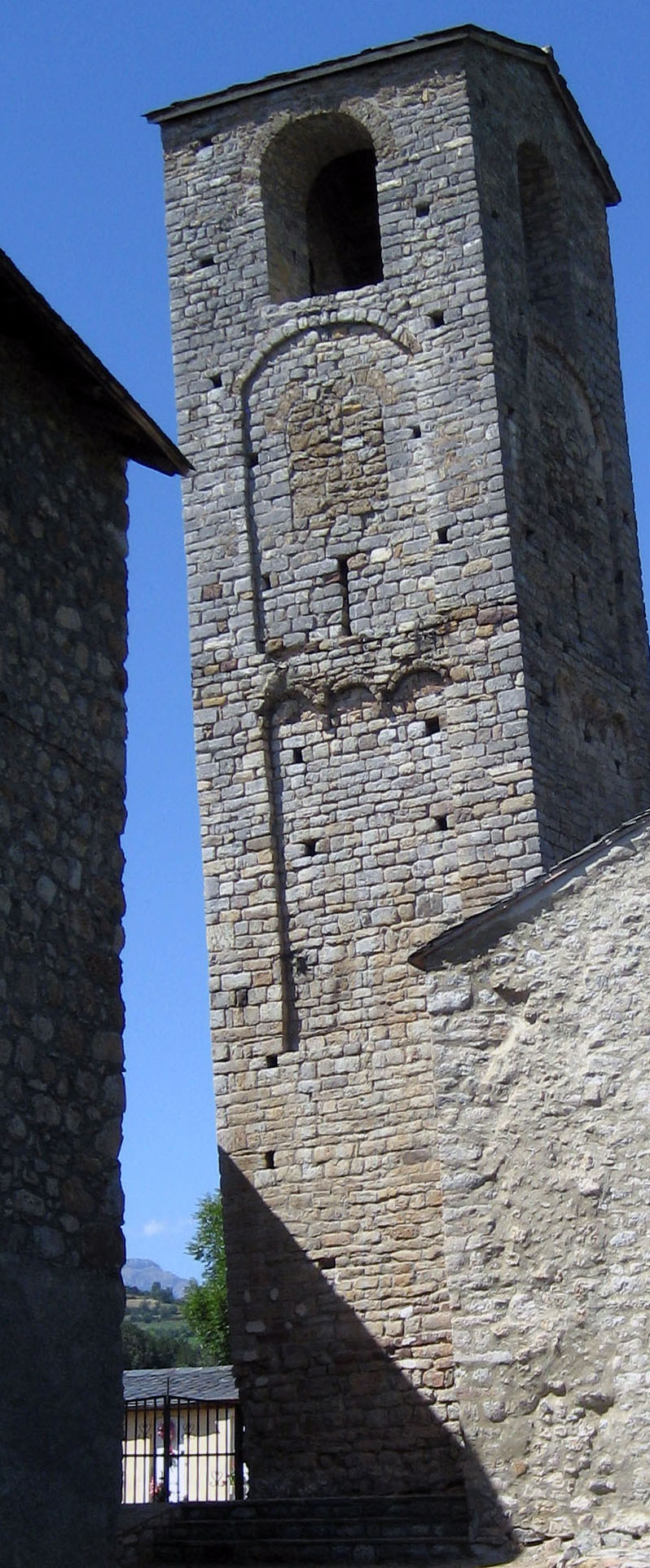 Campanar torre romànic inclinat de l'església de Santa Eugènia de Nerellà.Baixa Cerdanya. Catalunya